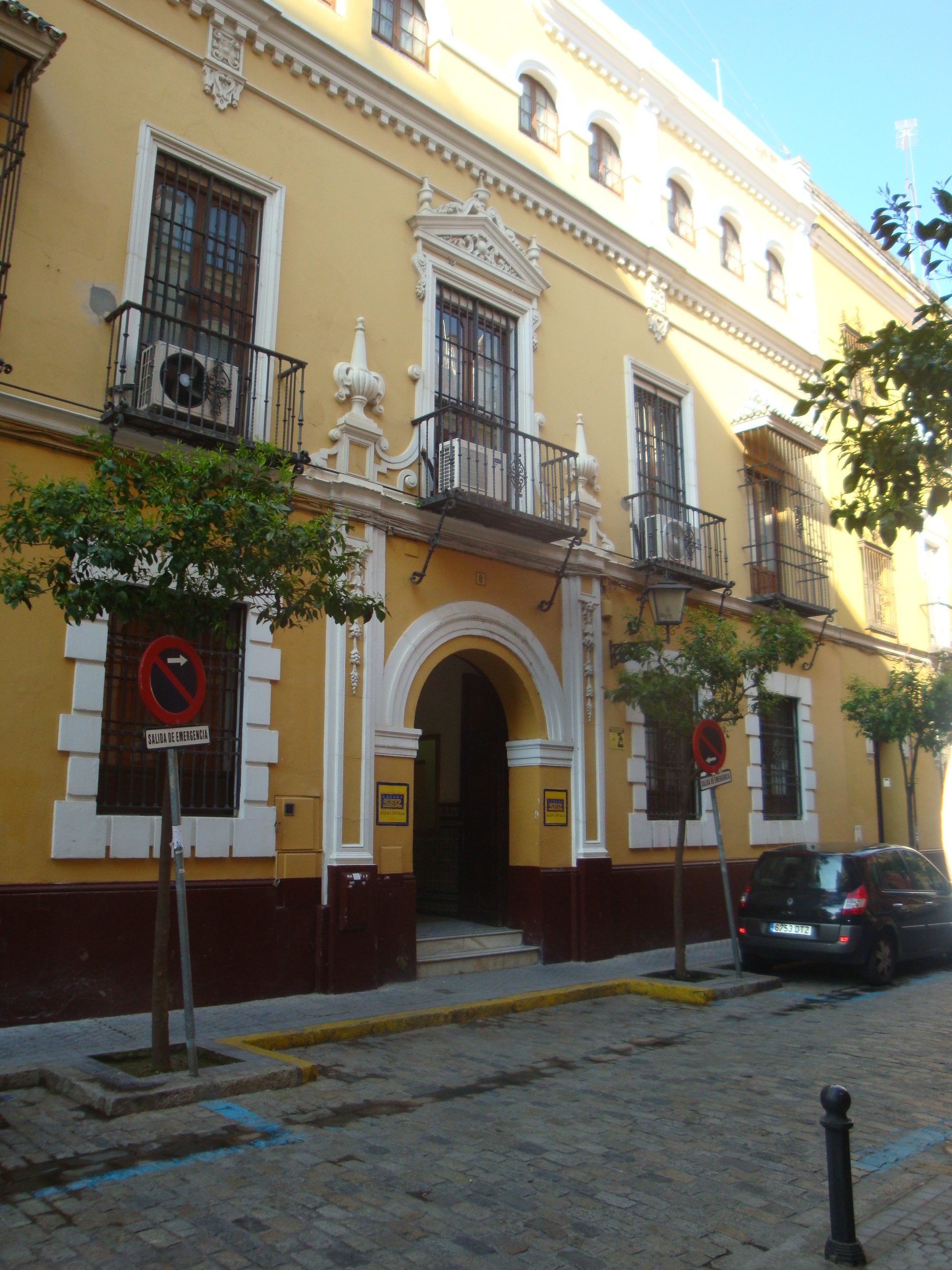 Sede de Radio Sevilla